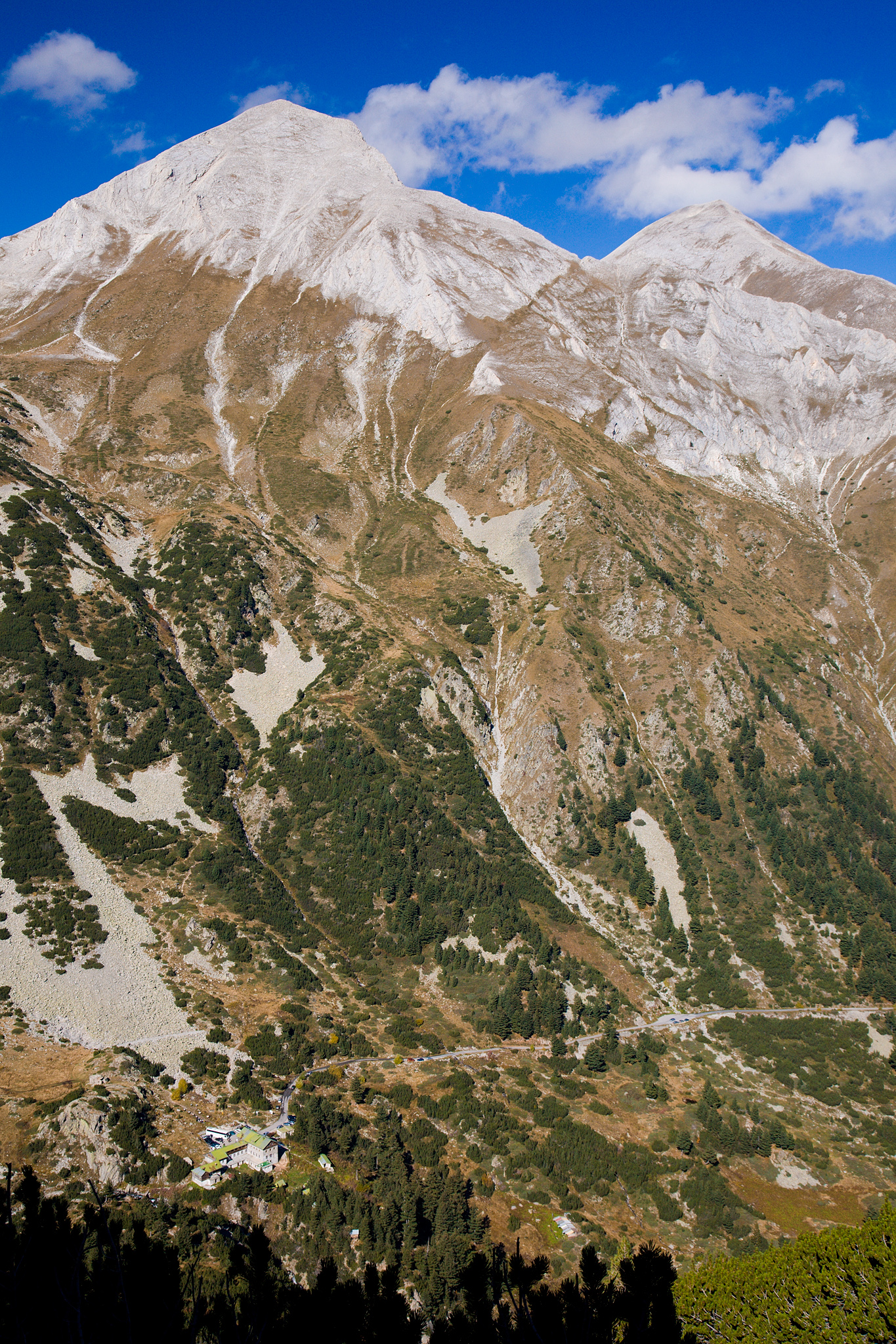 Пирин, връх Вихрен в Пирин планина